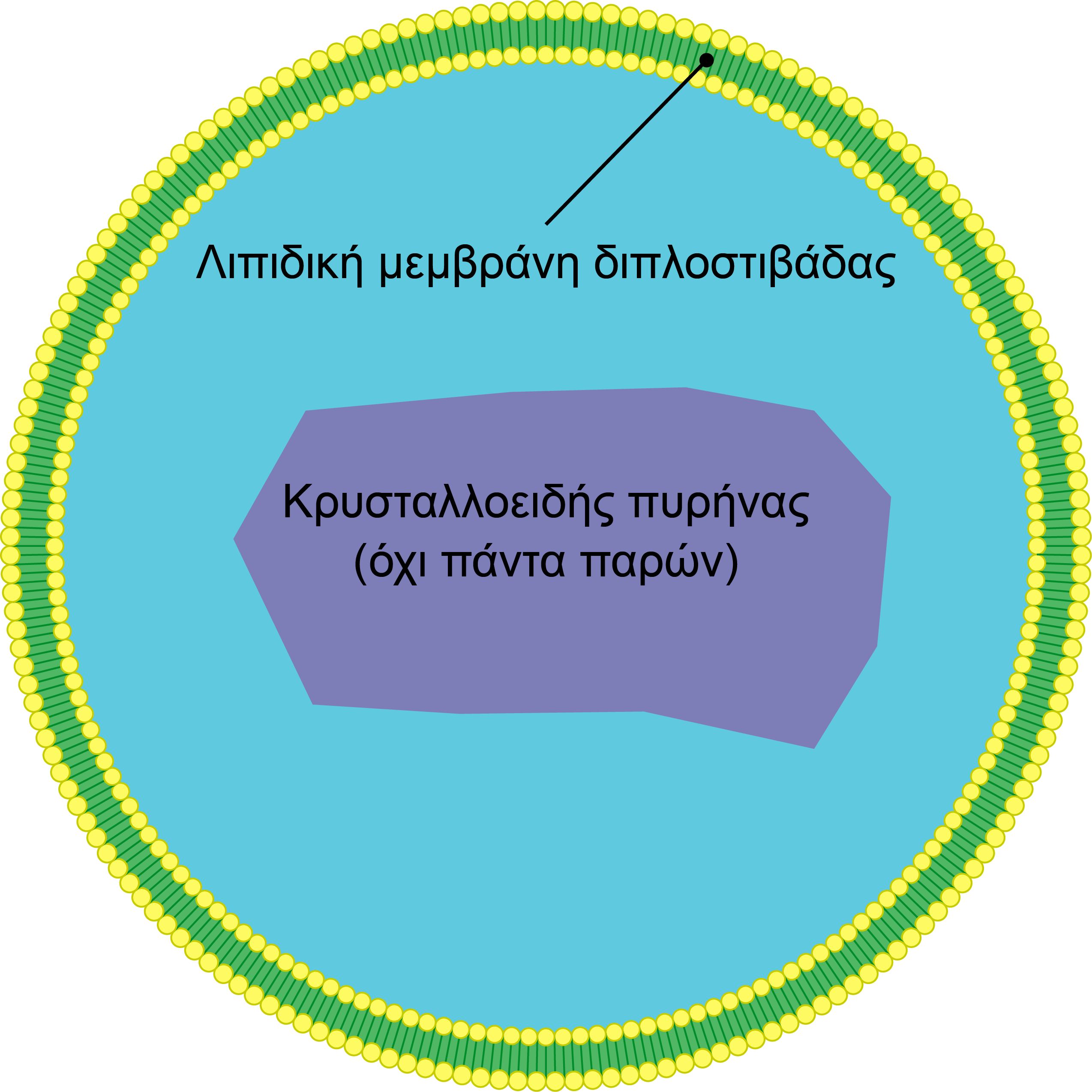 Βασική δομή ενός υπεροξεισώματος